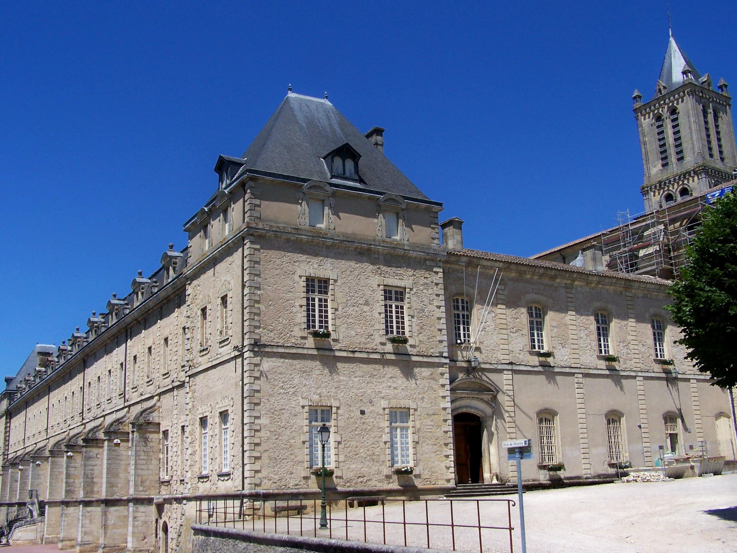 Mairie de La Réole, Gironde, France